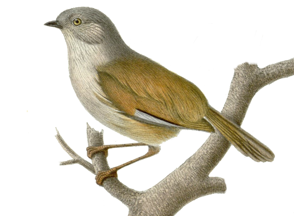 Fulvetta cinereiceps (syn. Alcippe cinereiceps)